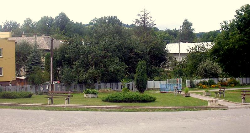 Križovatka, autobusová zastávka v obci Sedlice. Okres Prešov.Slovensko.